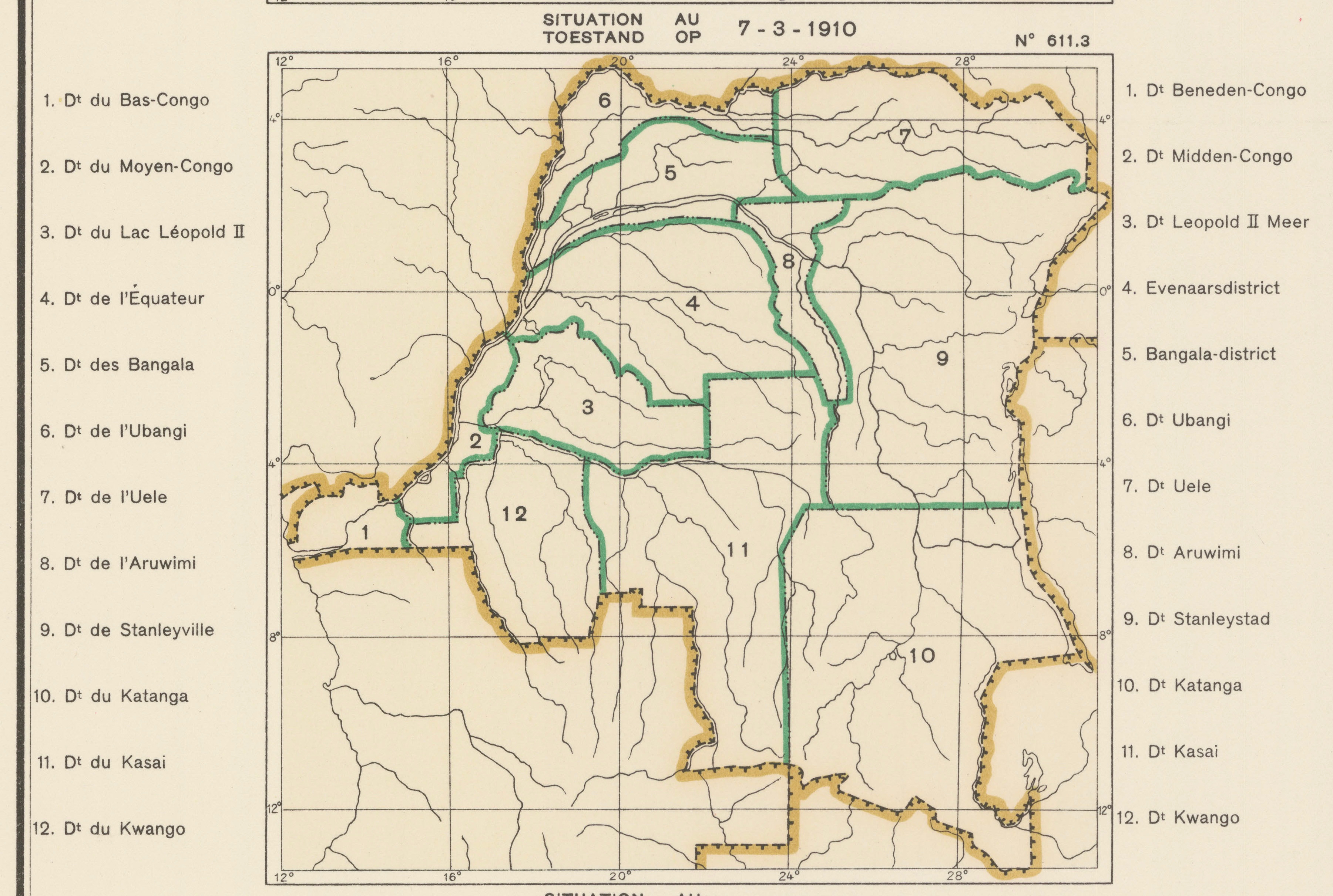 Carte des subdivisions administrative